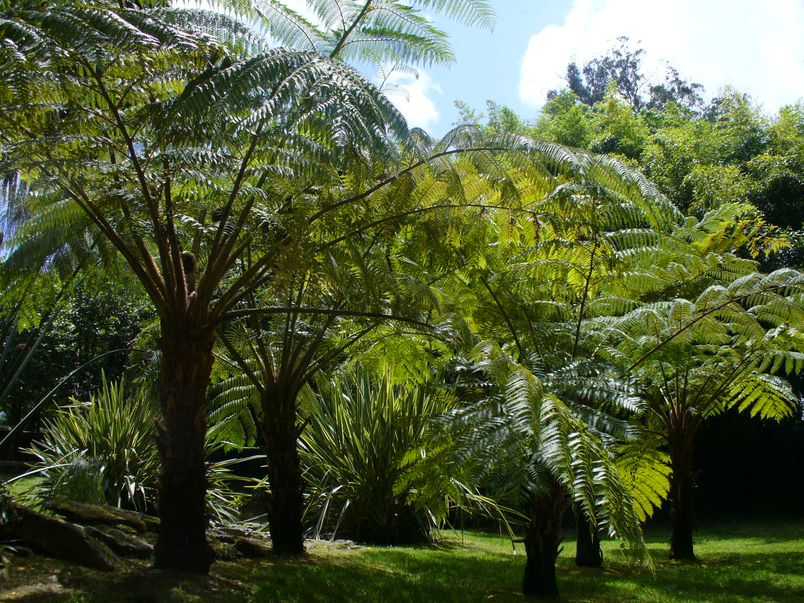 Arbofilikoj (Dicksonia antarctica) el Australio, en la Palaco Quiñones de León, Vigo, Galegio